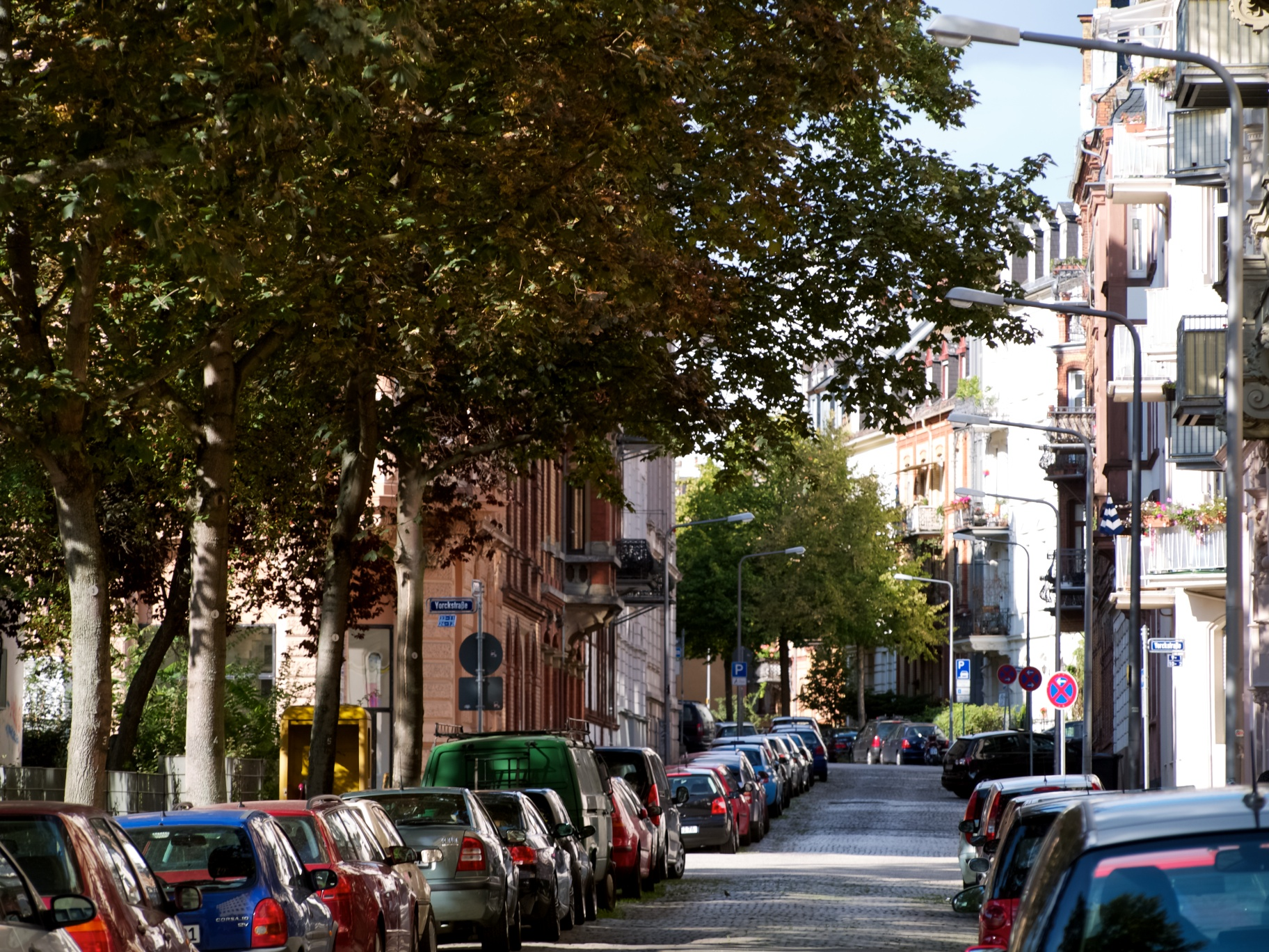 Straße am Blücherplatz, Westend, Wiesbaden.